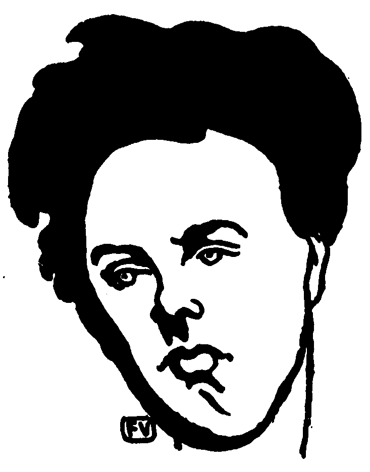 Portrait of Arthur Rimbaud (1854-1891) from Le Livre des masques (vol. II, 1898) by Remy de Gourmont (1858-1916)